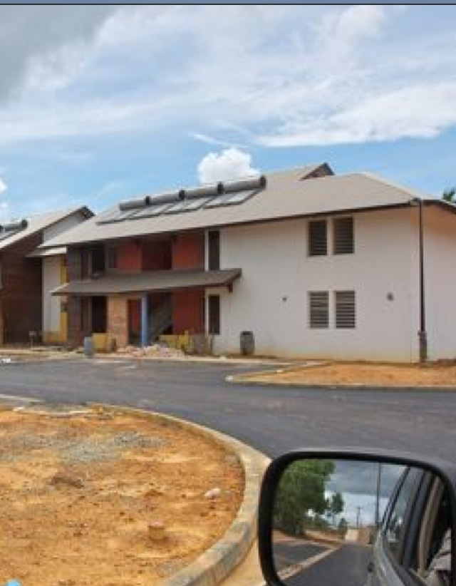 20 appartements à l' entrée du village dans un lotissement en construction